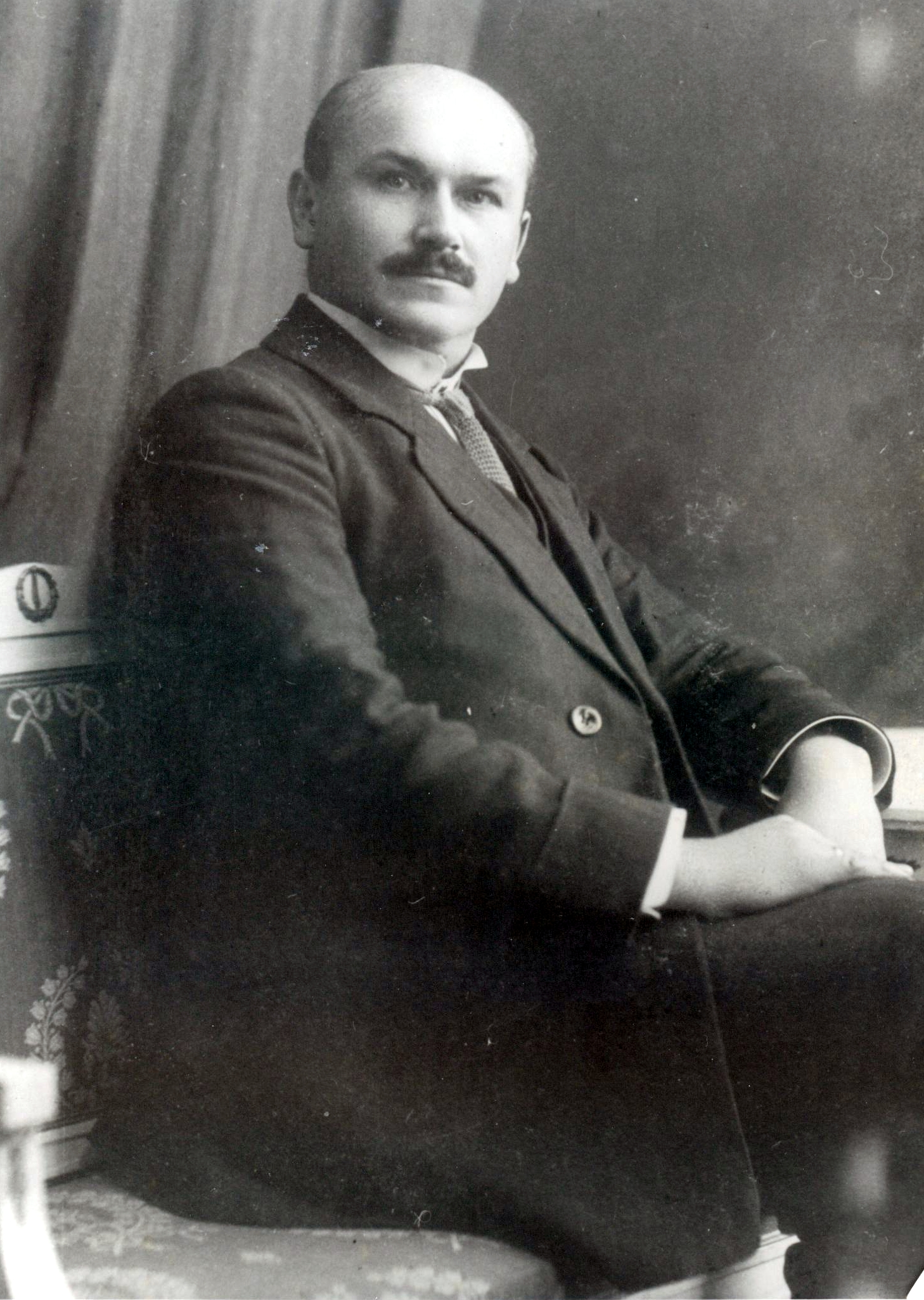 Jurij Słodeńk (1873–1945)